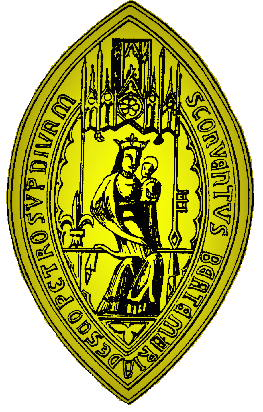 Abbaye de Saint-Pierre-sur-Dives, Calvados, Sceau (gravure ancienne retouchée)